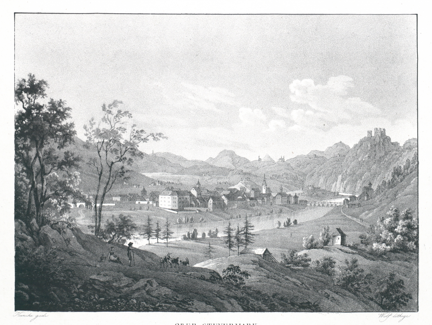 Celje